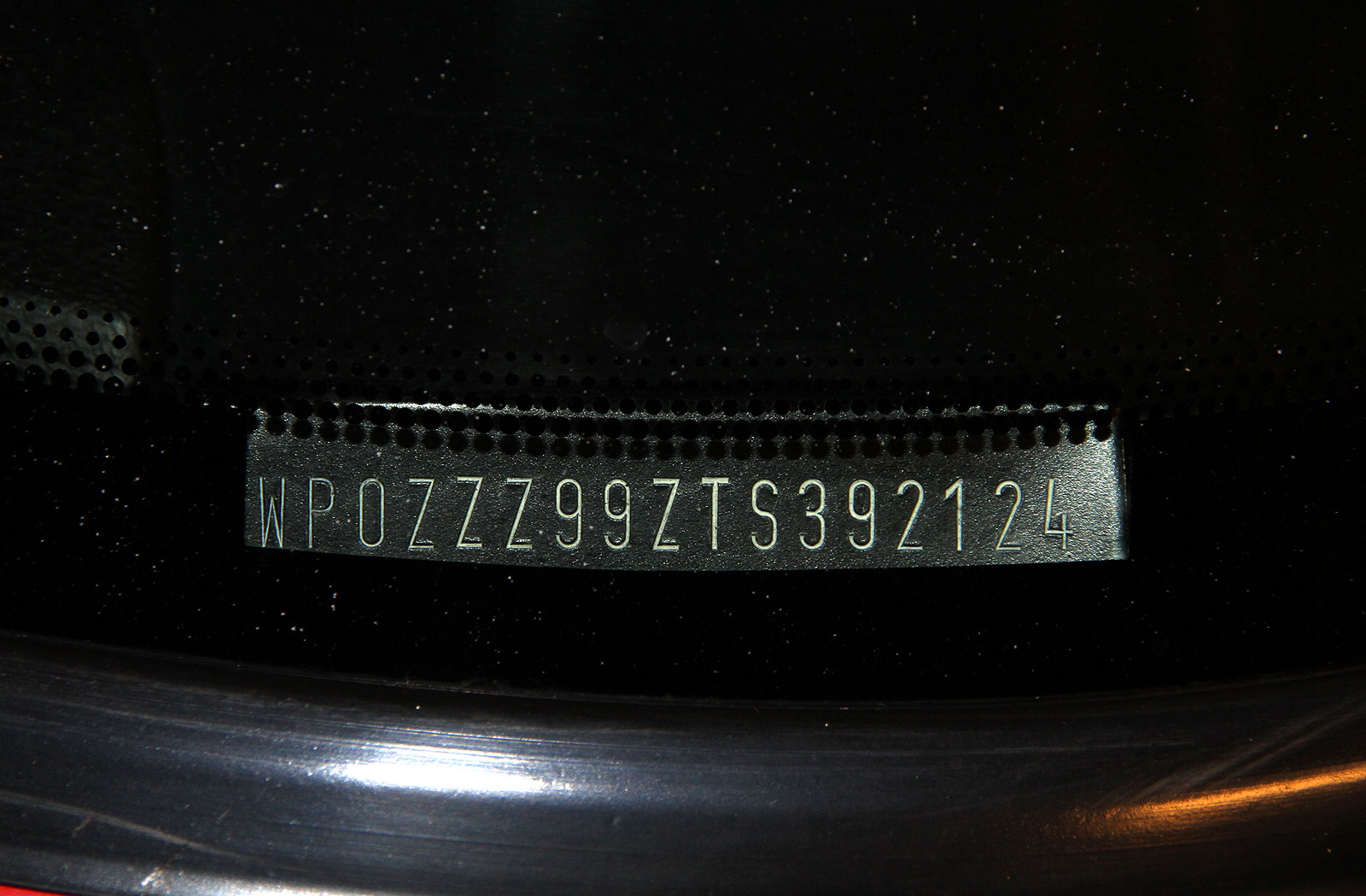 1996 Porsche 911 993 GT2